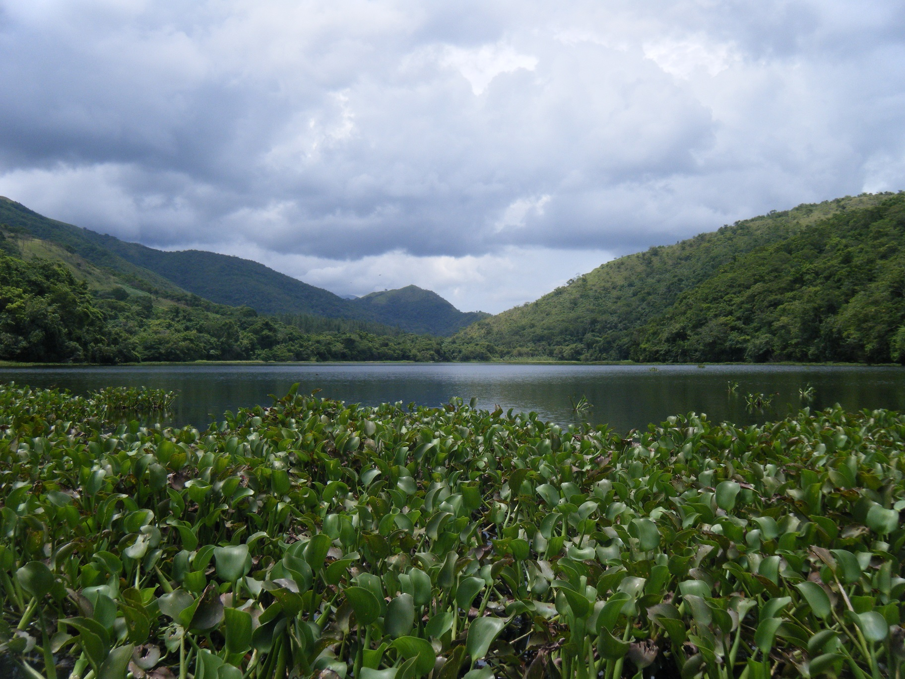 El Guamo (embalse), Estado Monagas, Venezuela.